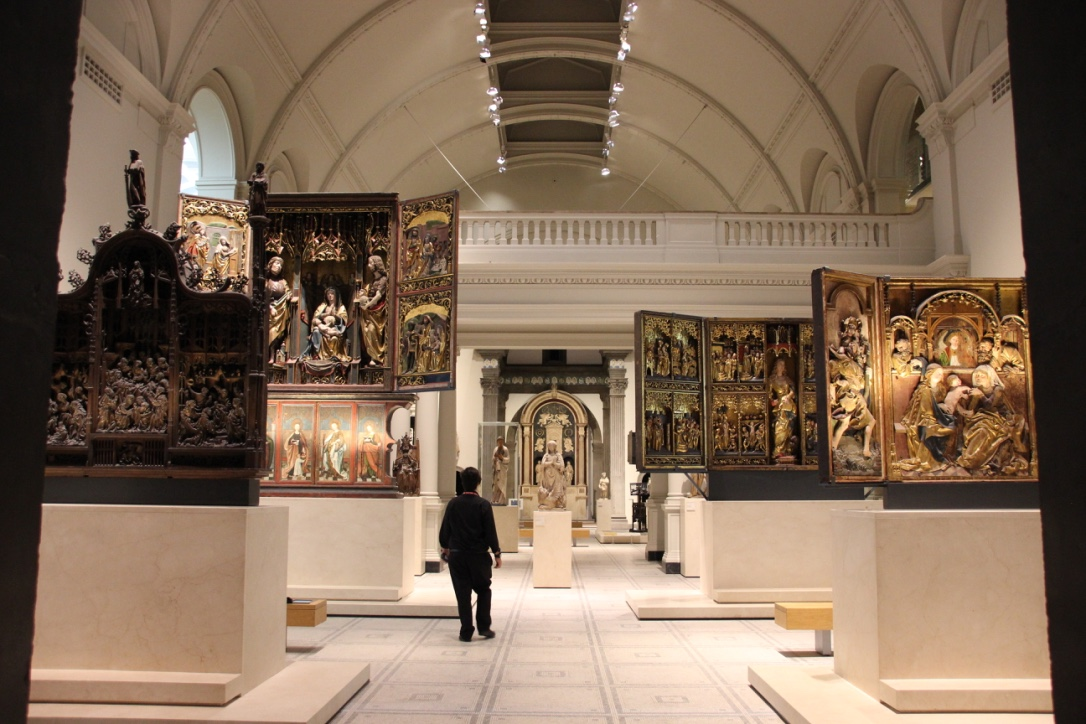 Altar-Raum